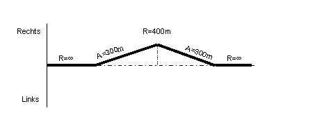 de=Krümmungsband einer Scheitelklotoide